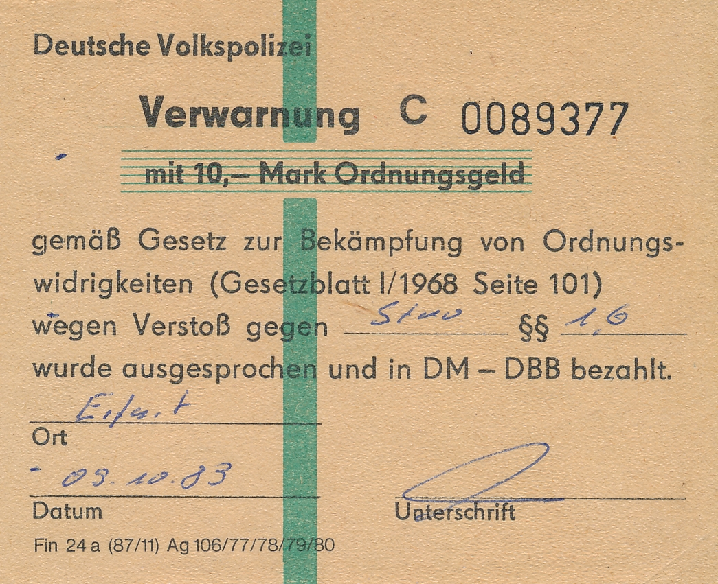 Verwarngeld der Volkspolizei Erfurt (DDR 1983)